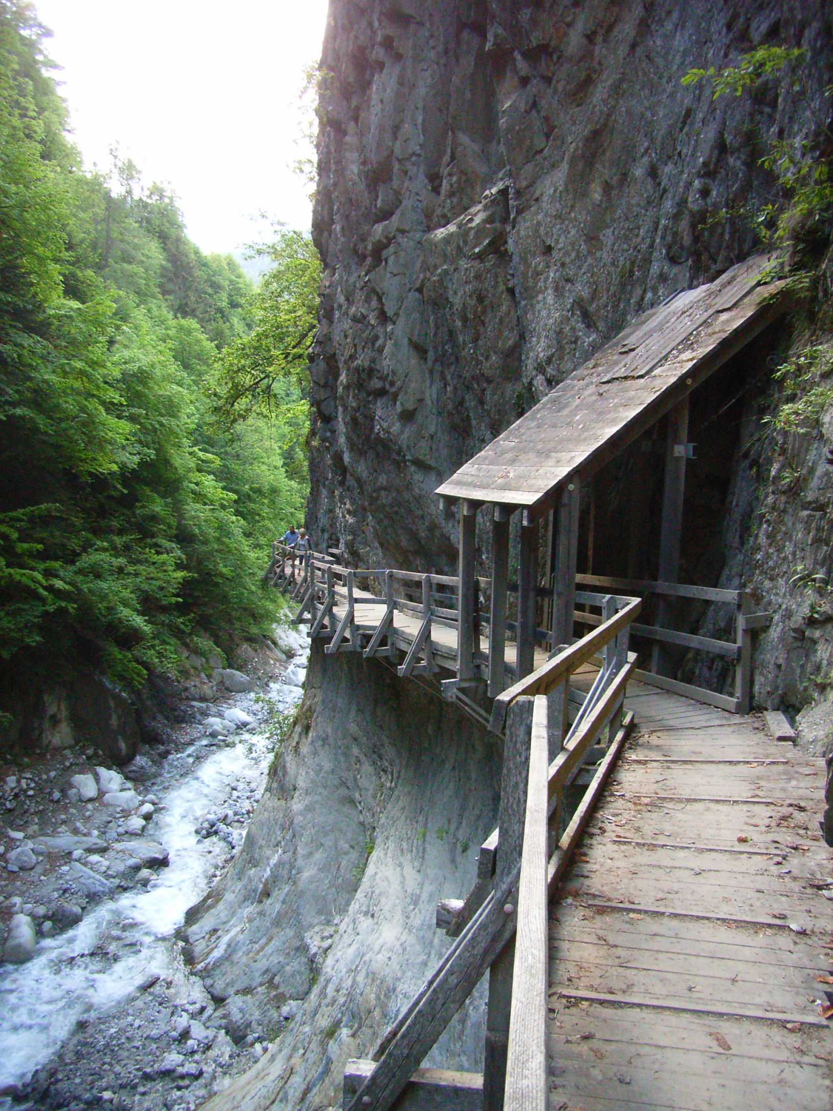 Gorges du Durnand, Schweiz/Valais